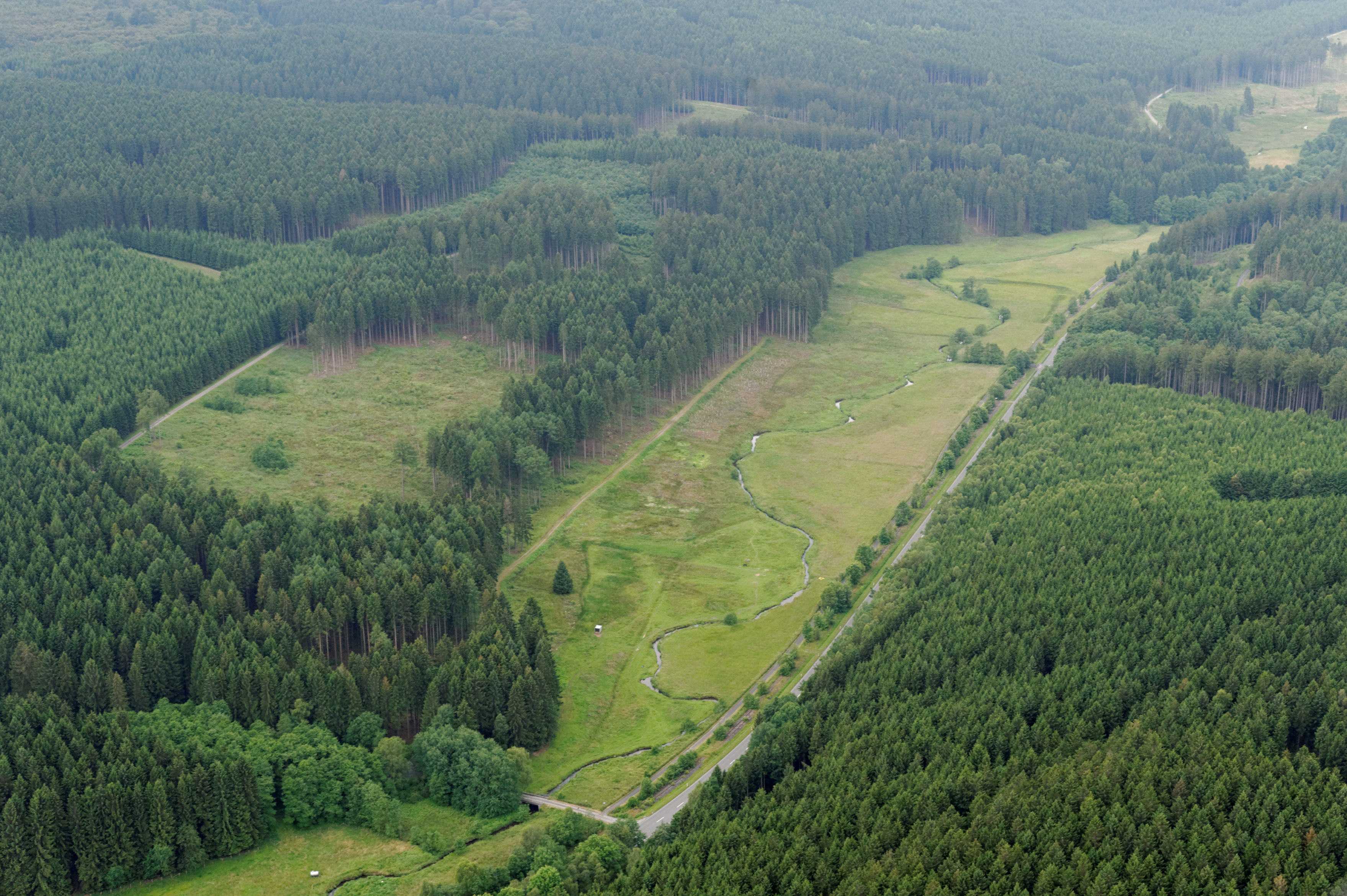 Fotoflug Sauerland Nord. Arnsberger Wald mit Teil des Naturschutzgebiet Möhnetal. The making of this document was supported by the Community-Budget of Wikimedia Germany.